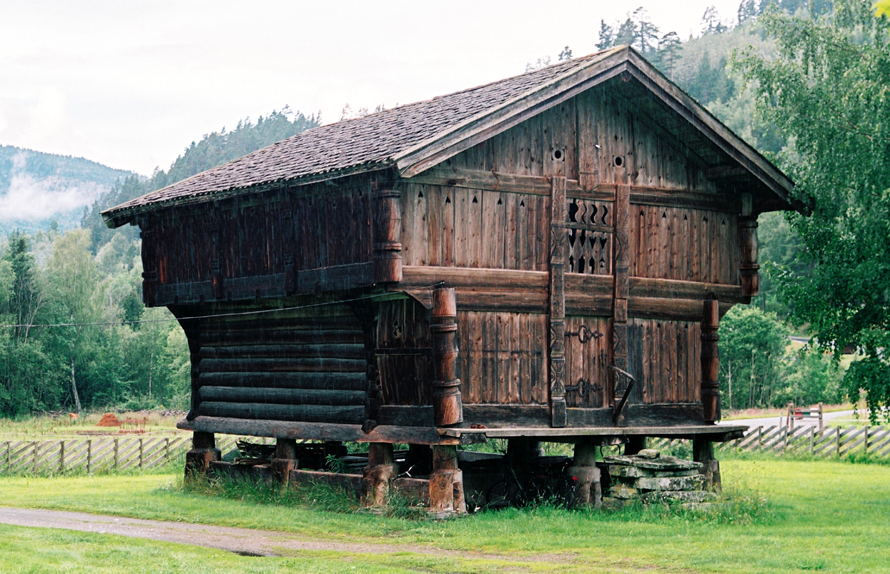 Stabbur/loft, Rollag prestegard, Buskerud. 1700-tallet. Freda 1991.